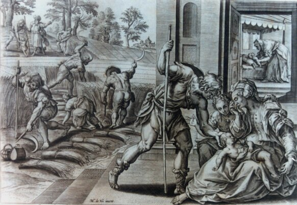 Страница "Лицевой Библии" Пискатора (XVII век).